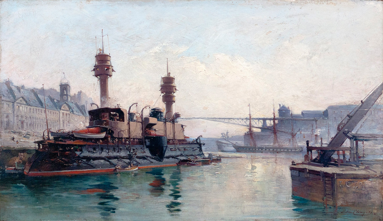 Le cuirassé Neptune en Penfeld